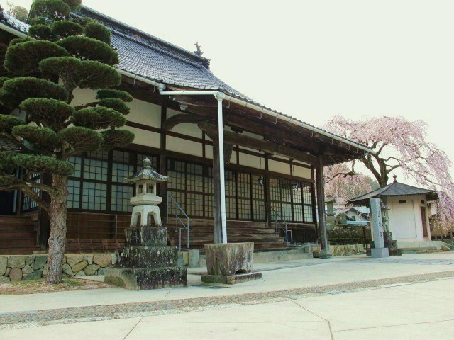 蓮照寺 本堂